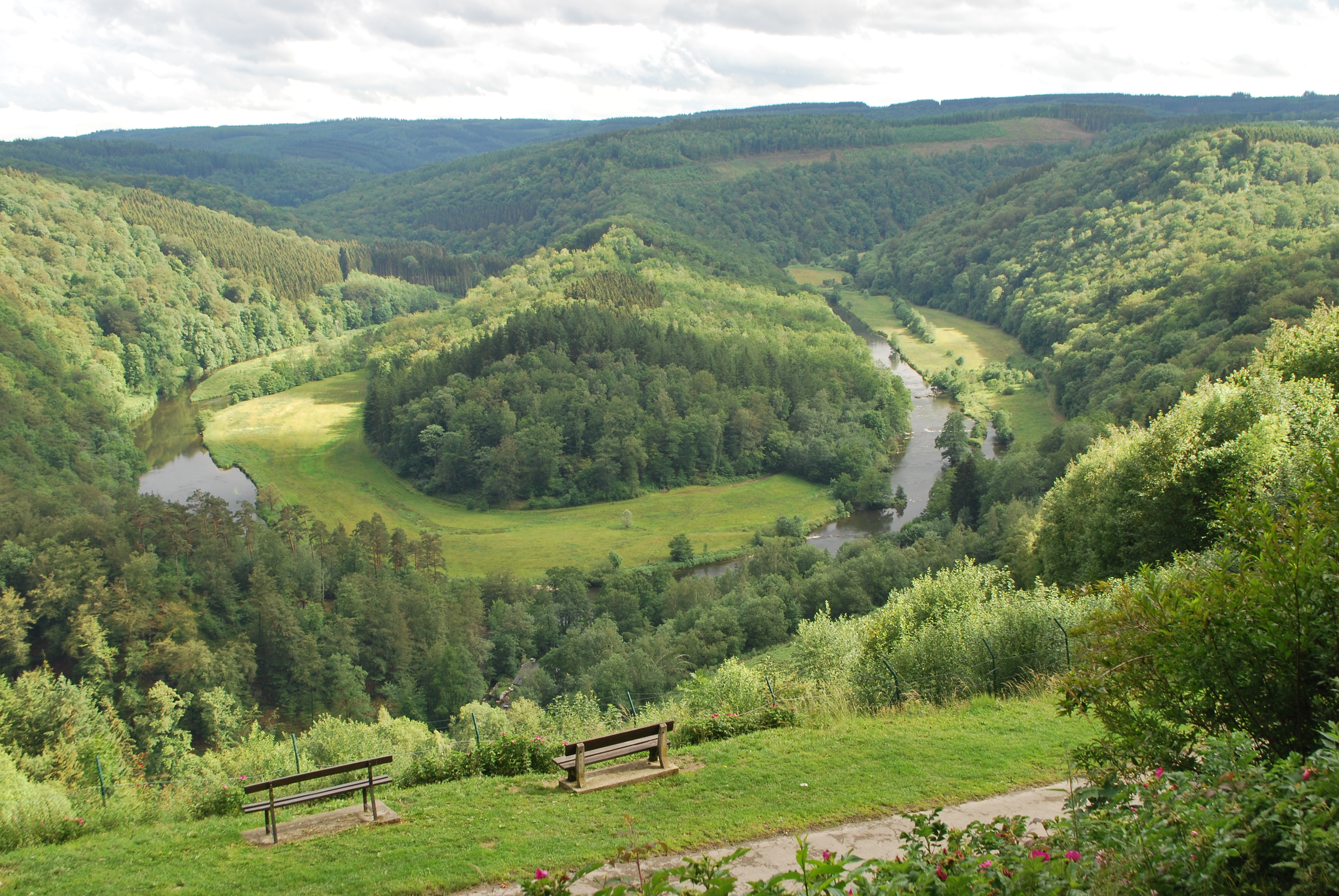 Méandre de la Semois à Ucimont